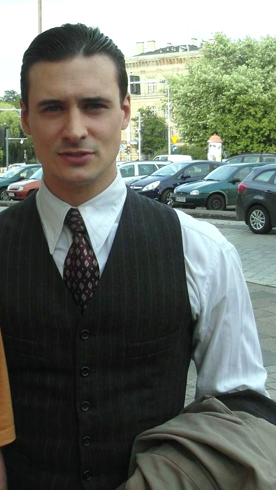 Mateusz Damięcki jako Adam Brodzisz na planie serialu "Bodo".